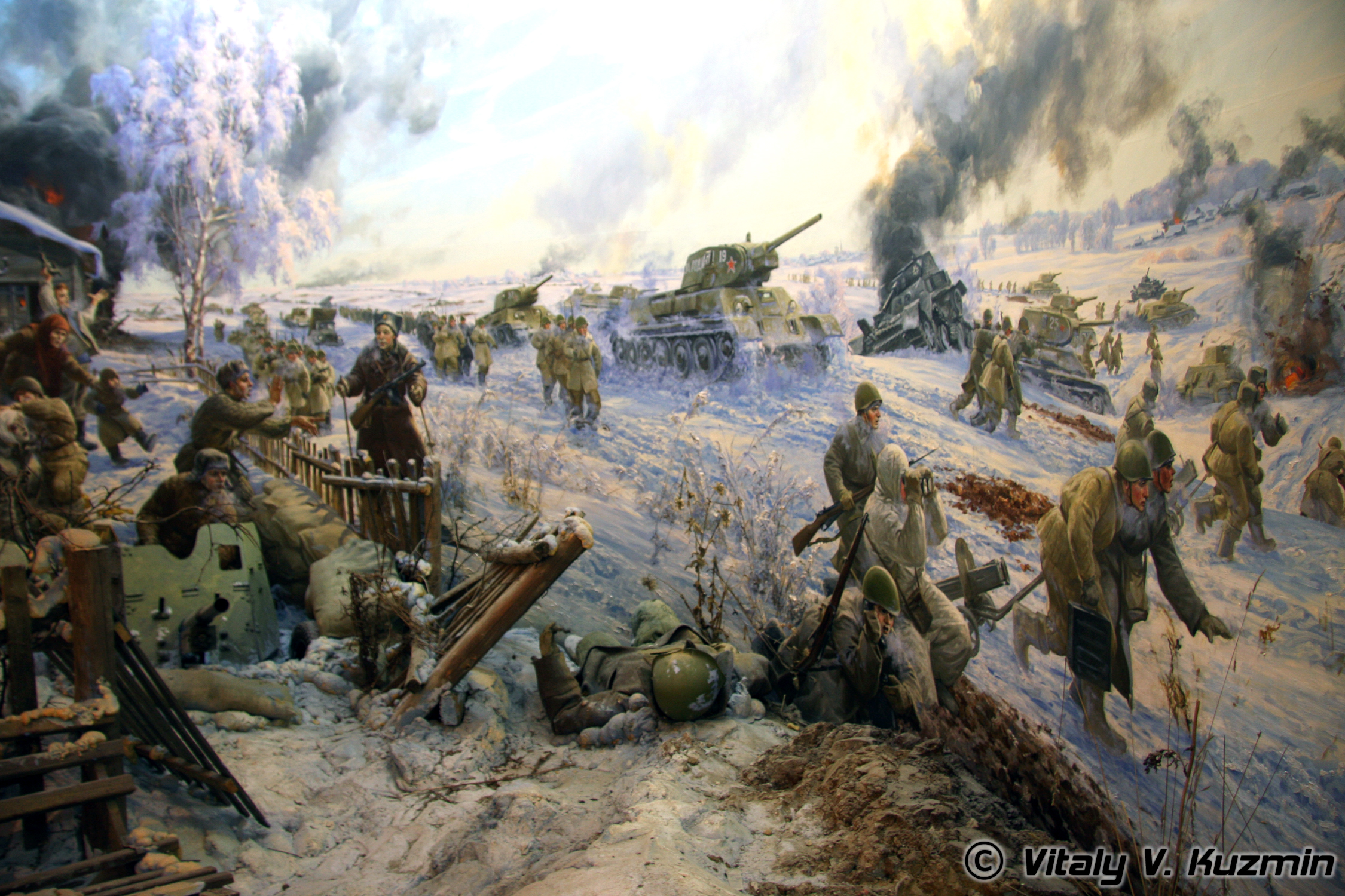 Диорама Лобня. Наступление. 6.12.1941г.